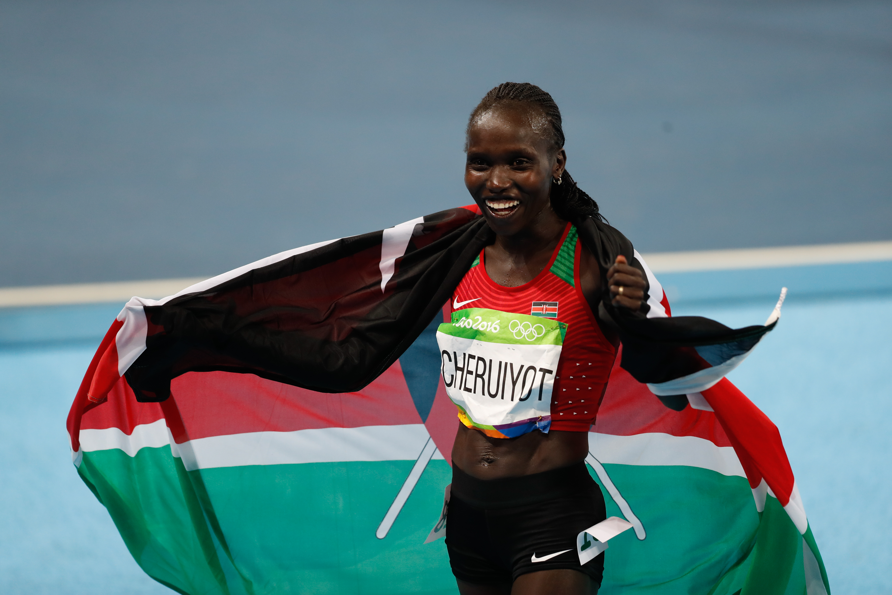 Rio de Janeiro - A queniana Vivian Jepkemoi Cheruiyot vence final e bate recorde olímpico dos 5 mil metros nos Jogos Rio 2016, no Estádio Olímpico (Fernando Frazão/Agência Brasil)